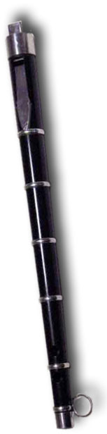 Txistu